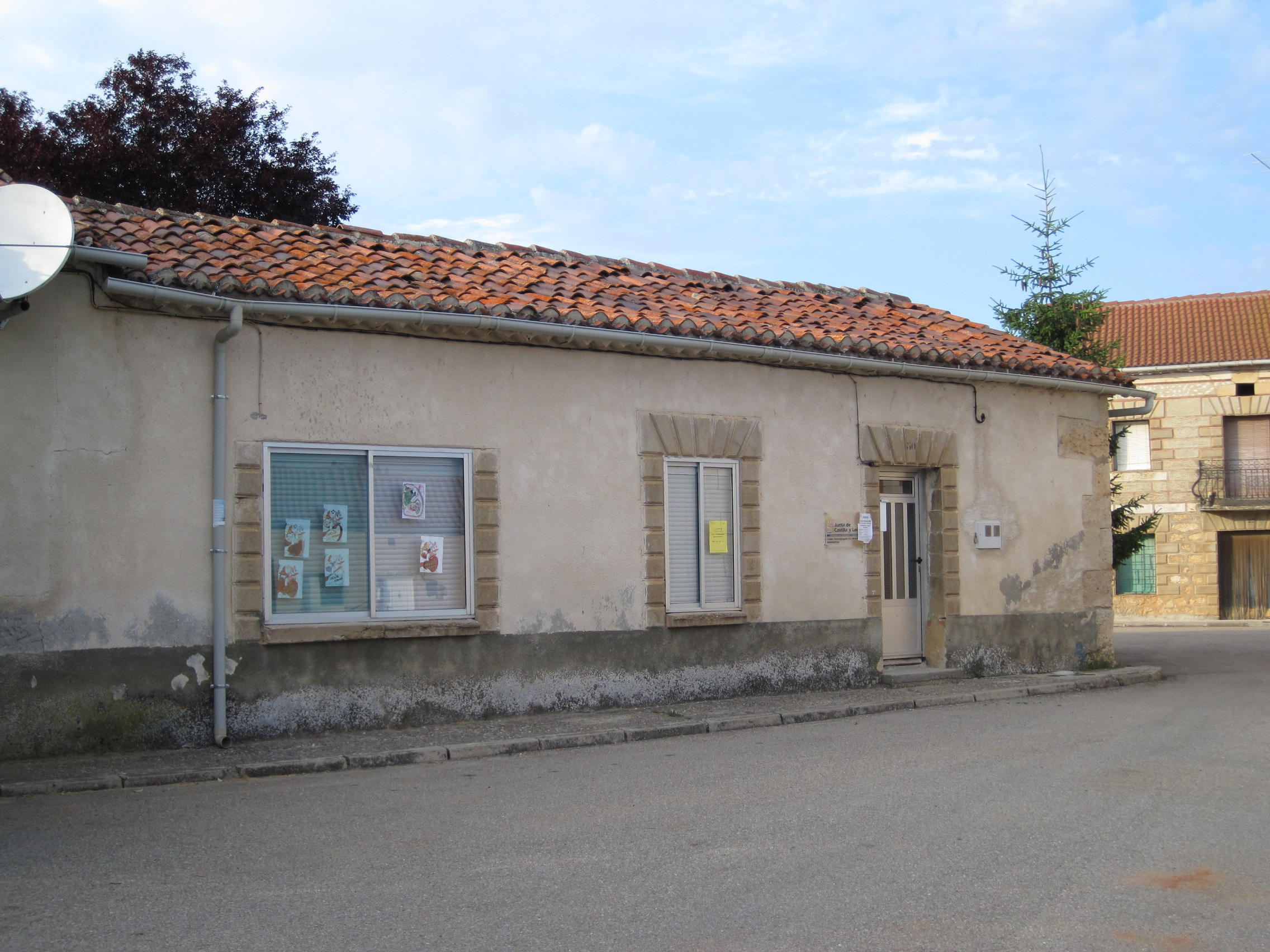 Escuelas de la localidad de Quintanarraya (Burgos, España).